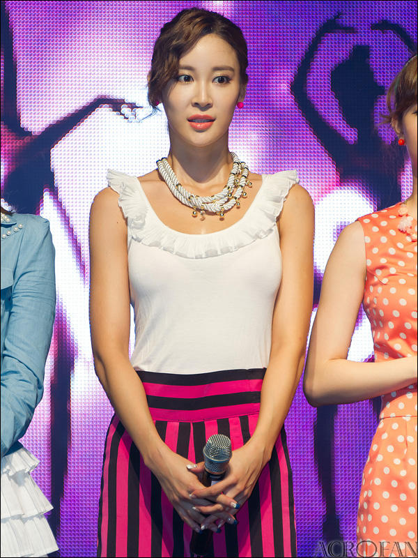 이샘, 나인뮤지스 '휘가로' 쇼케이스 현장에서